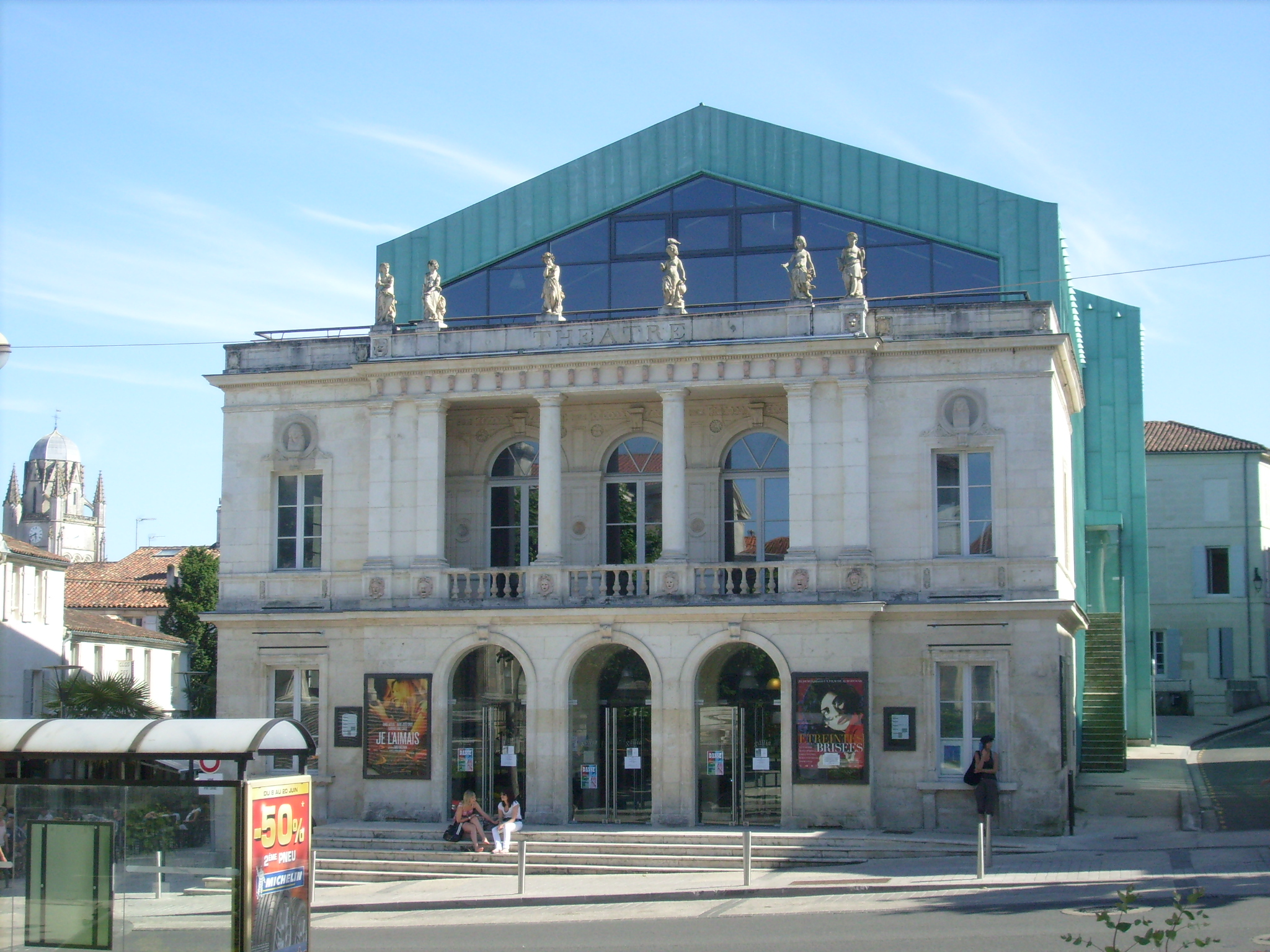 Le théâtre Gallia